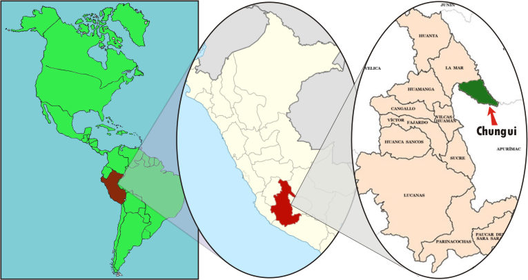 Ubicacion de Chungui